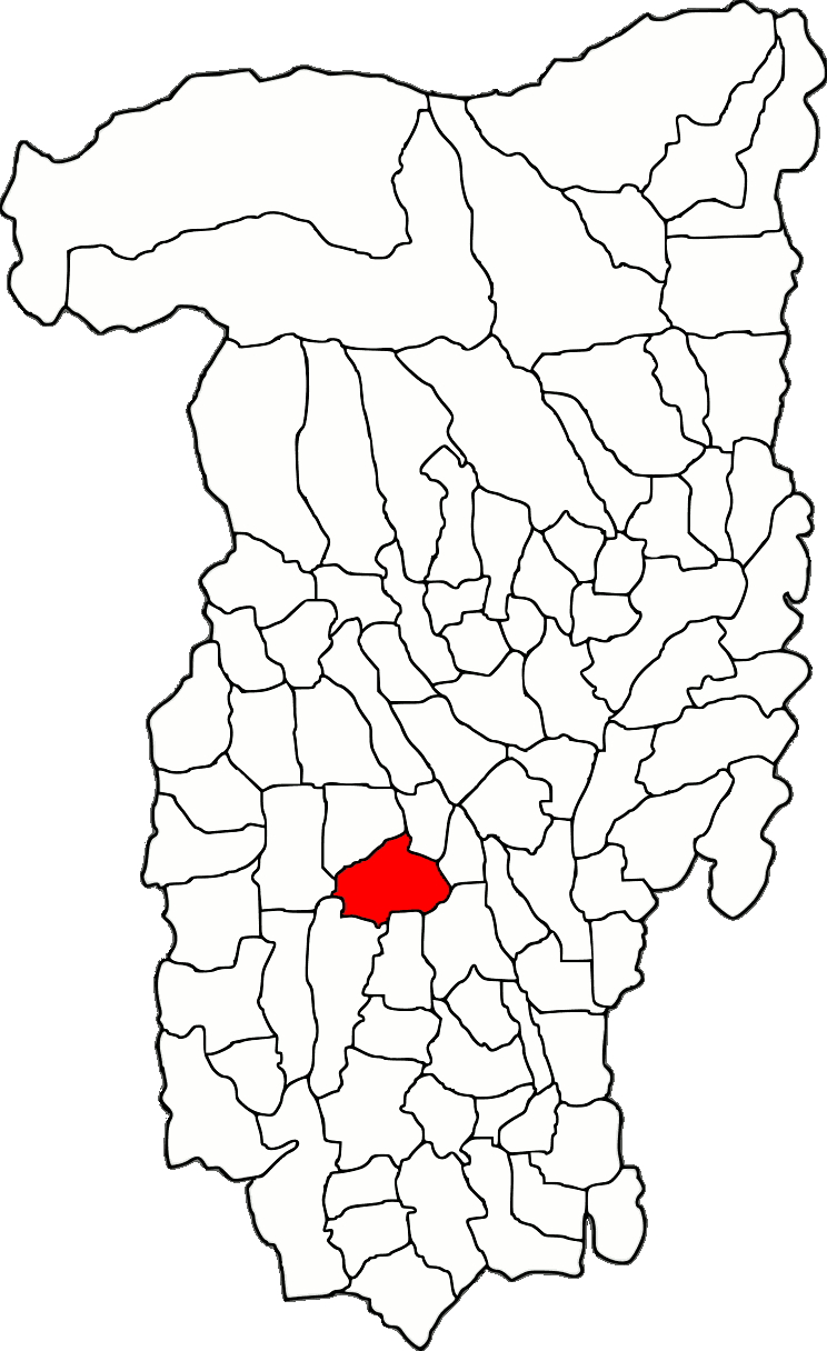 Lage der Gemeinde Lădești im Kreis Vâlcea (RO).